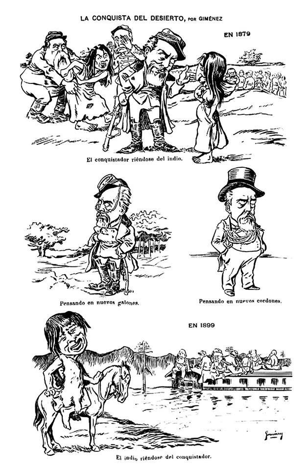 Caras y Caretas, sobre la inundación en Chubut de 1899